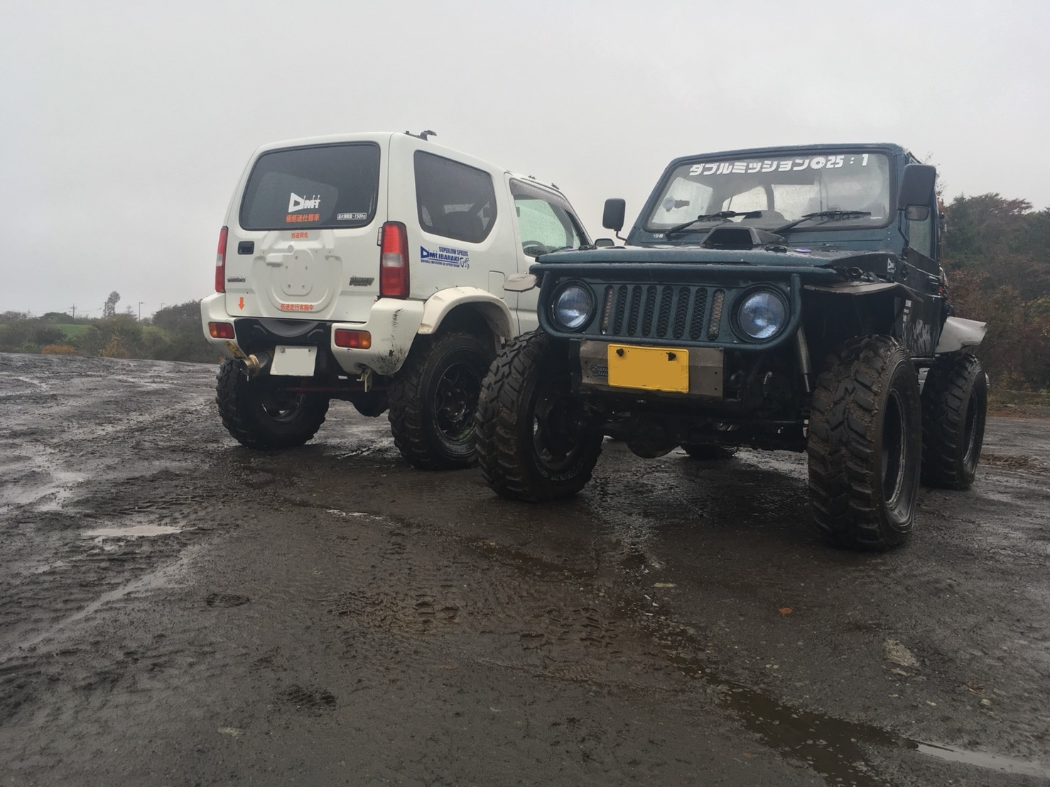 高度な改造が施されたスズキジムニー、石塚エンジニアリング製